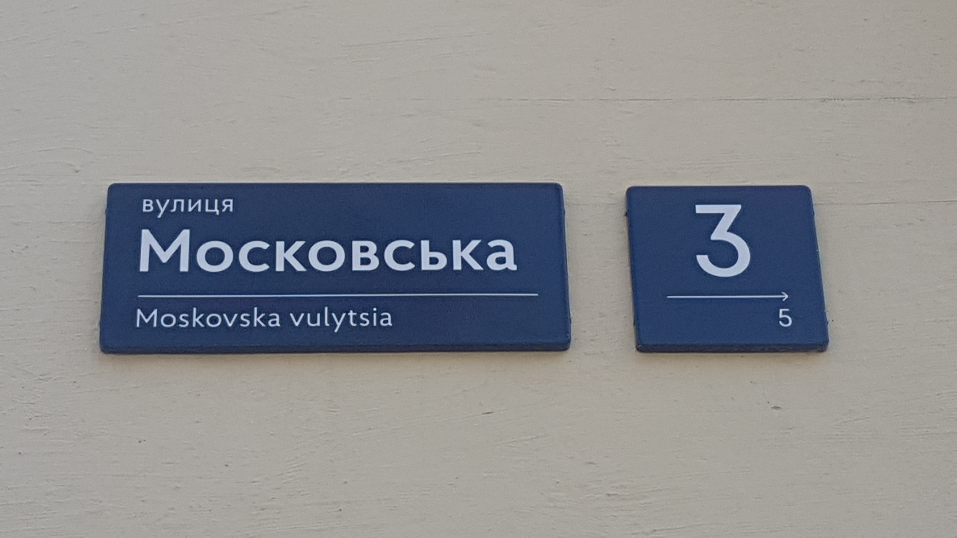 Украина, Киев, ул. Московская, 3